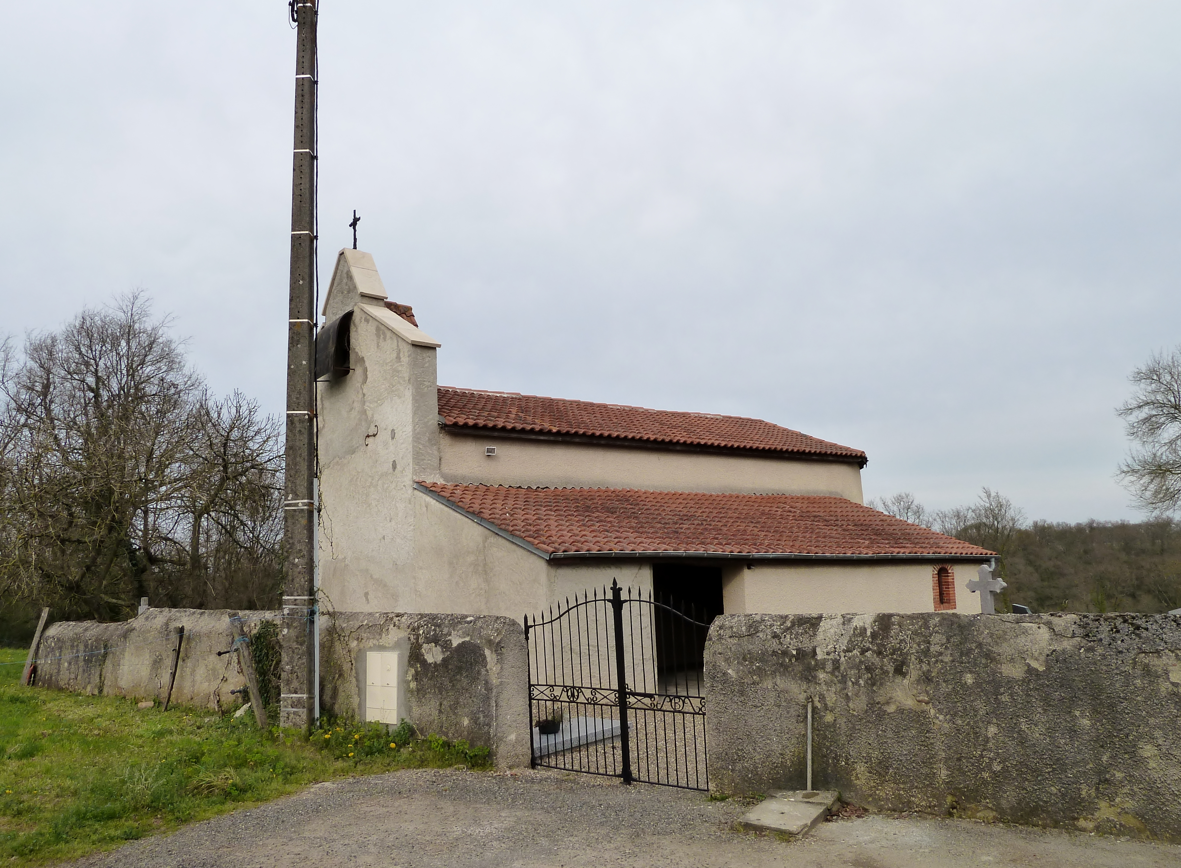 Ribarrouy